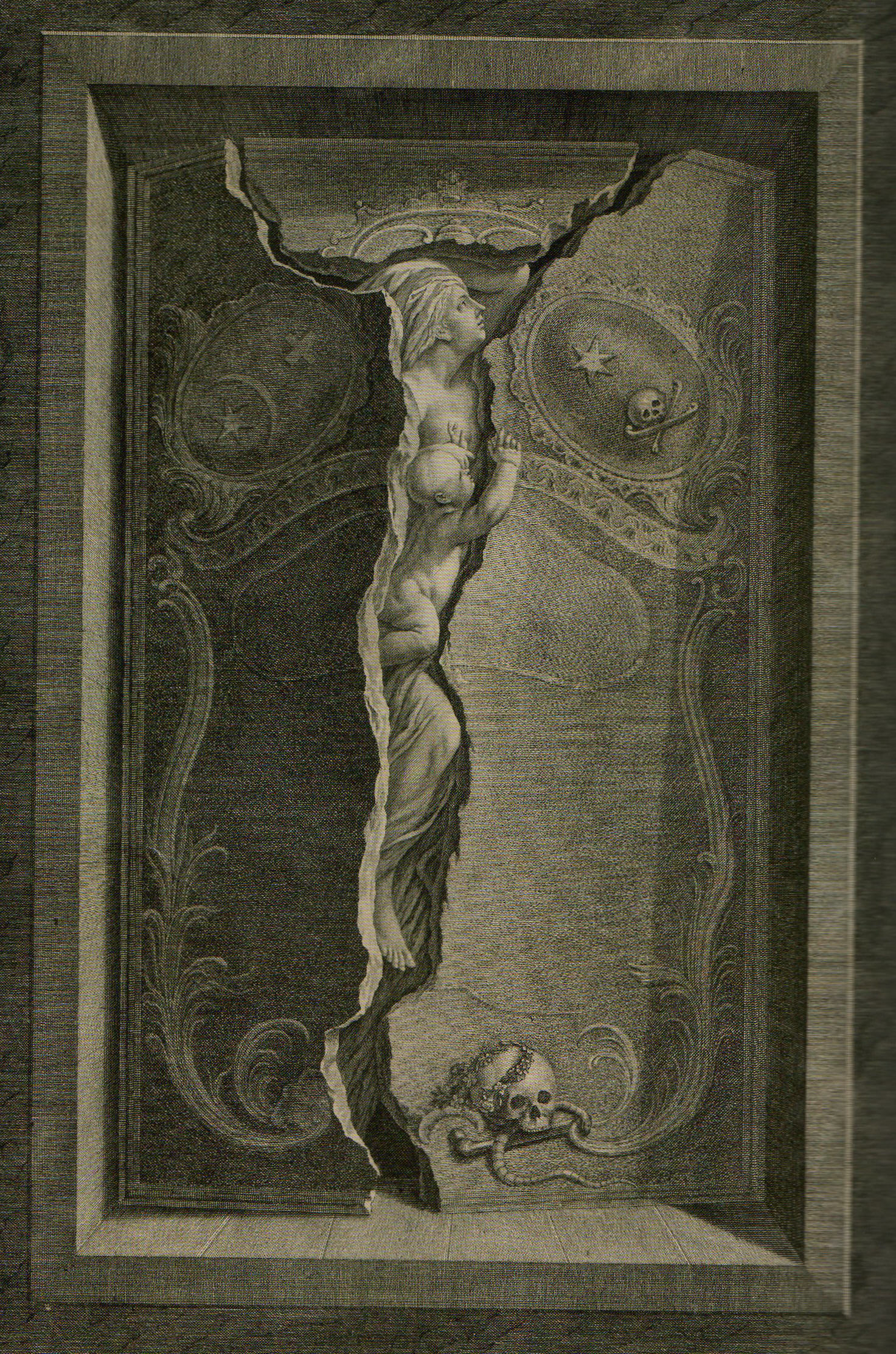 Radierung von Christian von Mechel, Grabmal der Pfarrersfrau Maria Magdalena Hansmann, 35,7 x 25,6 cm